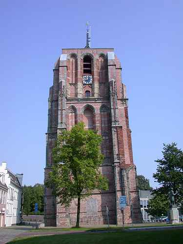 Zelf gemaakt, GNU